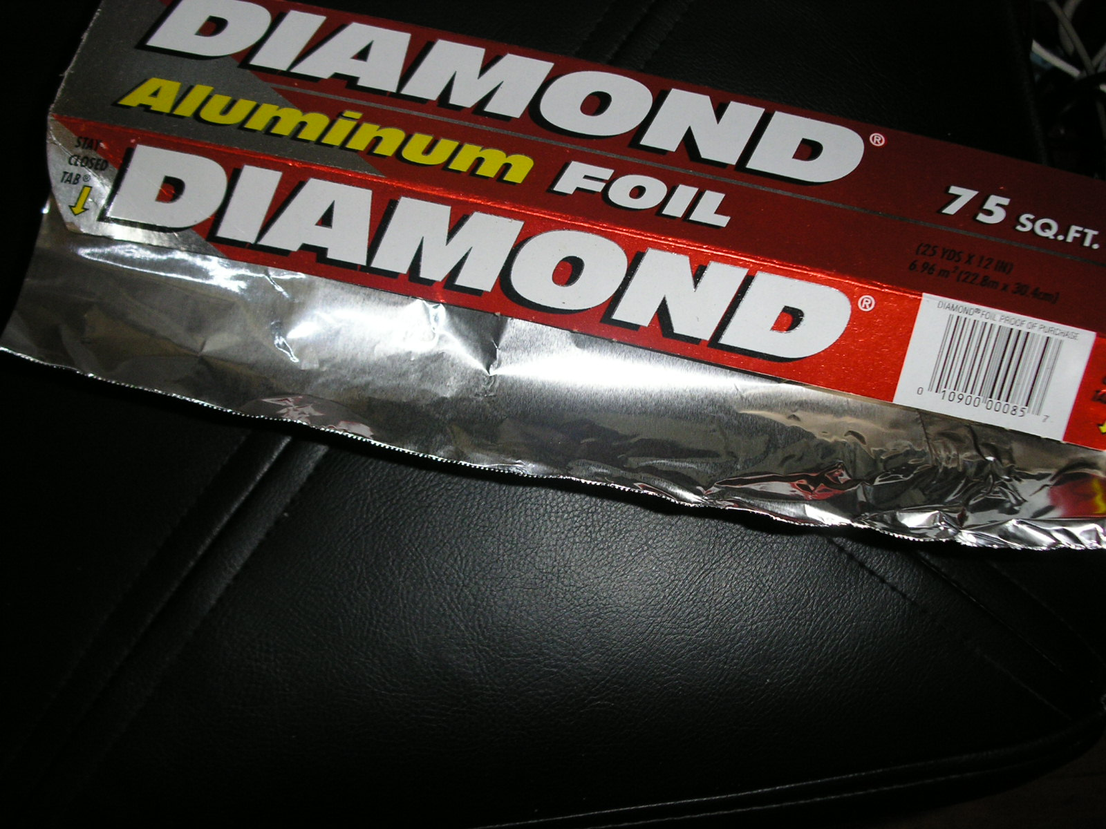 Aluminium Foil